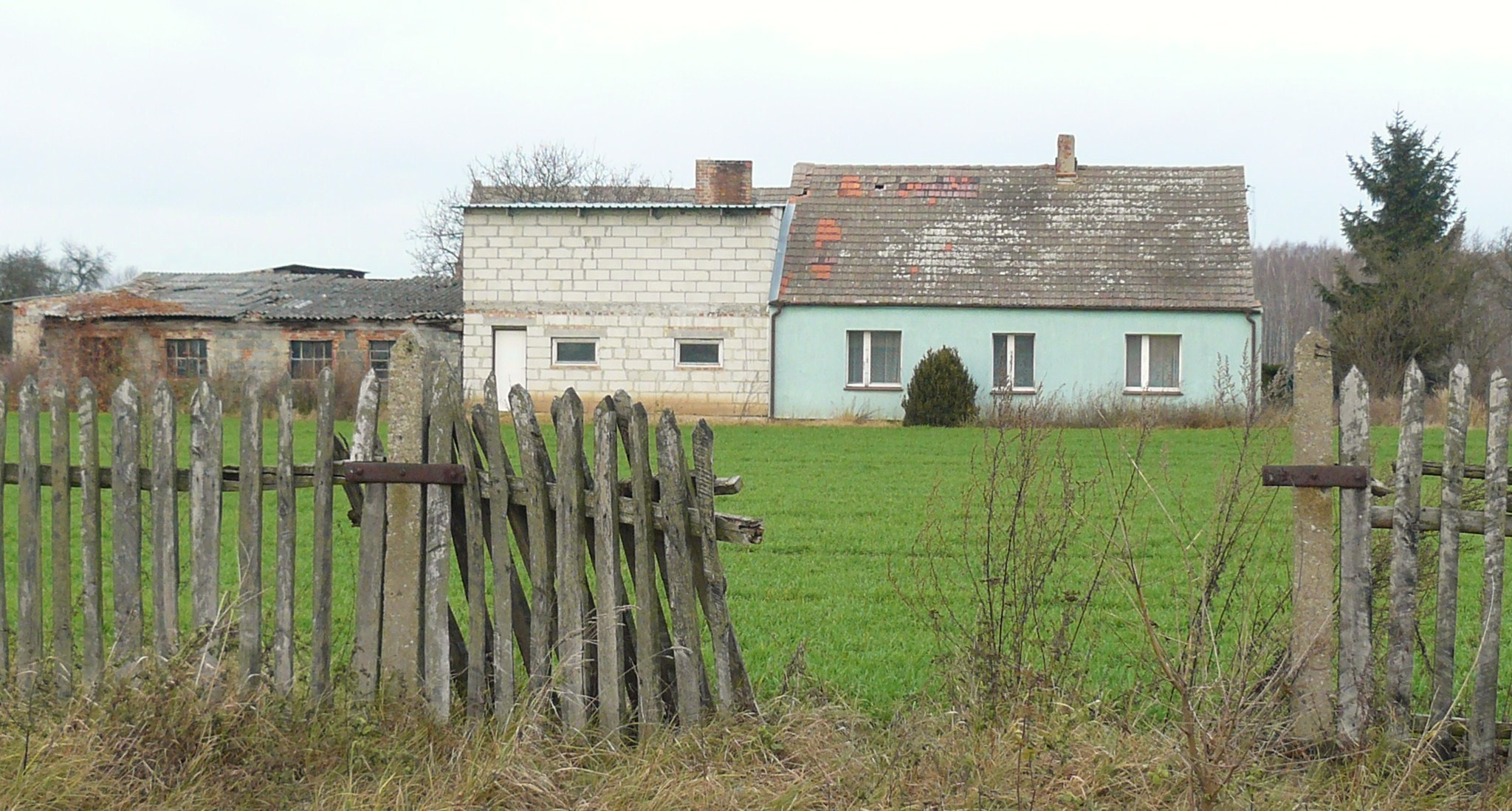 Poznań, Michałowo. Old house.